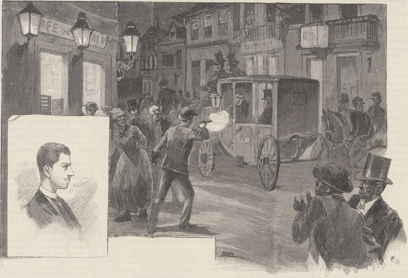 RIO DE JANEIRO. — Attentat contre l'emperur du Brésil. — Portrait d'Adriano Valle. — (Dessin de M. Faria, d'après le croquis de M. Netto.).